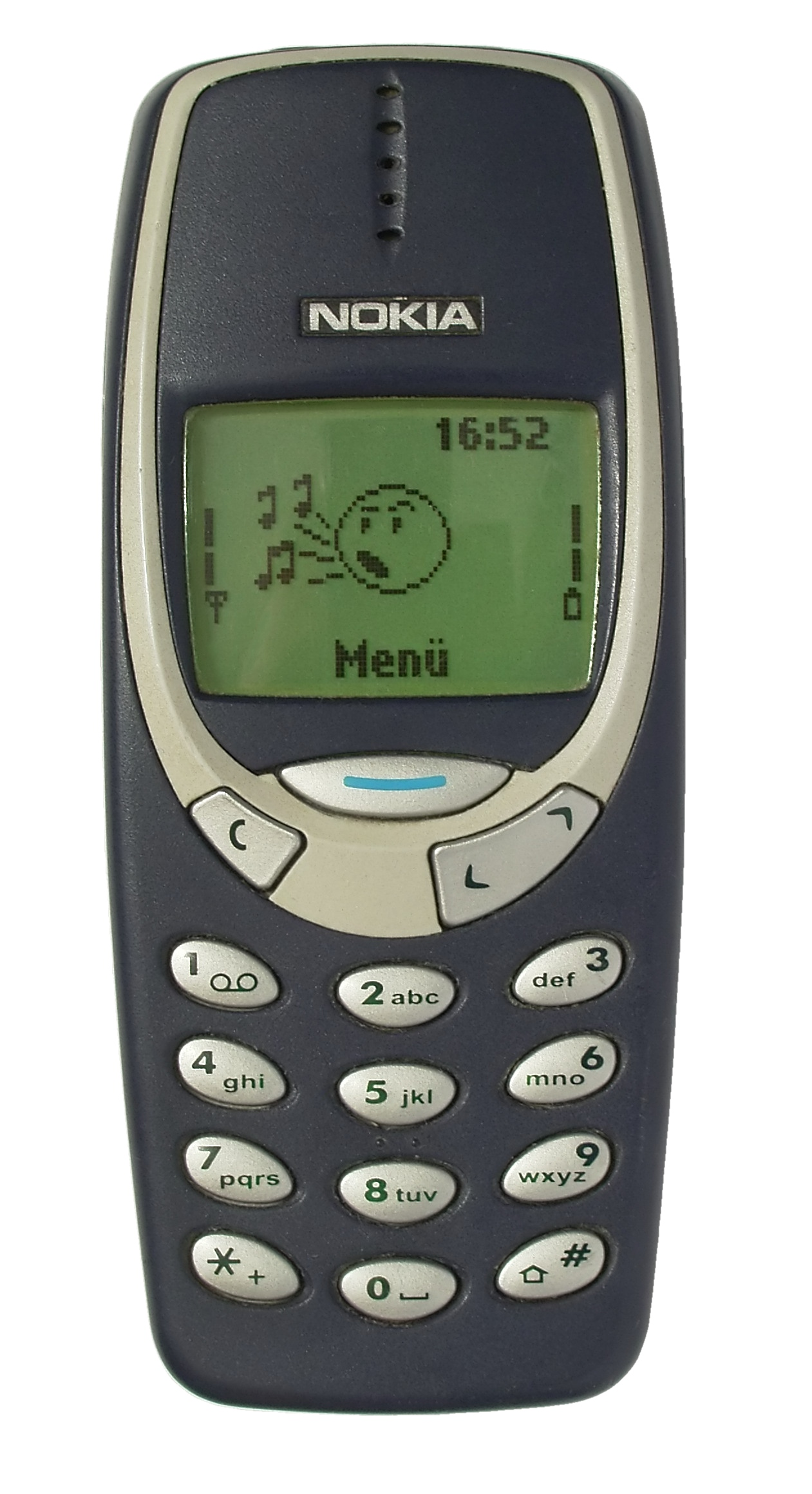 Blaue Version des Nokia 3310 Mobiltelefons mit deutschem Menü.